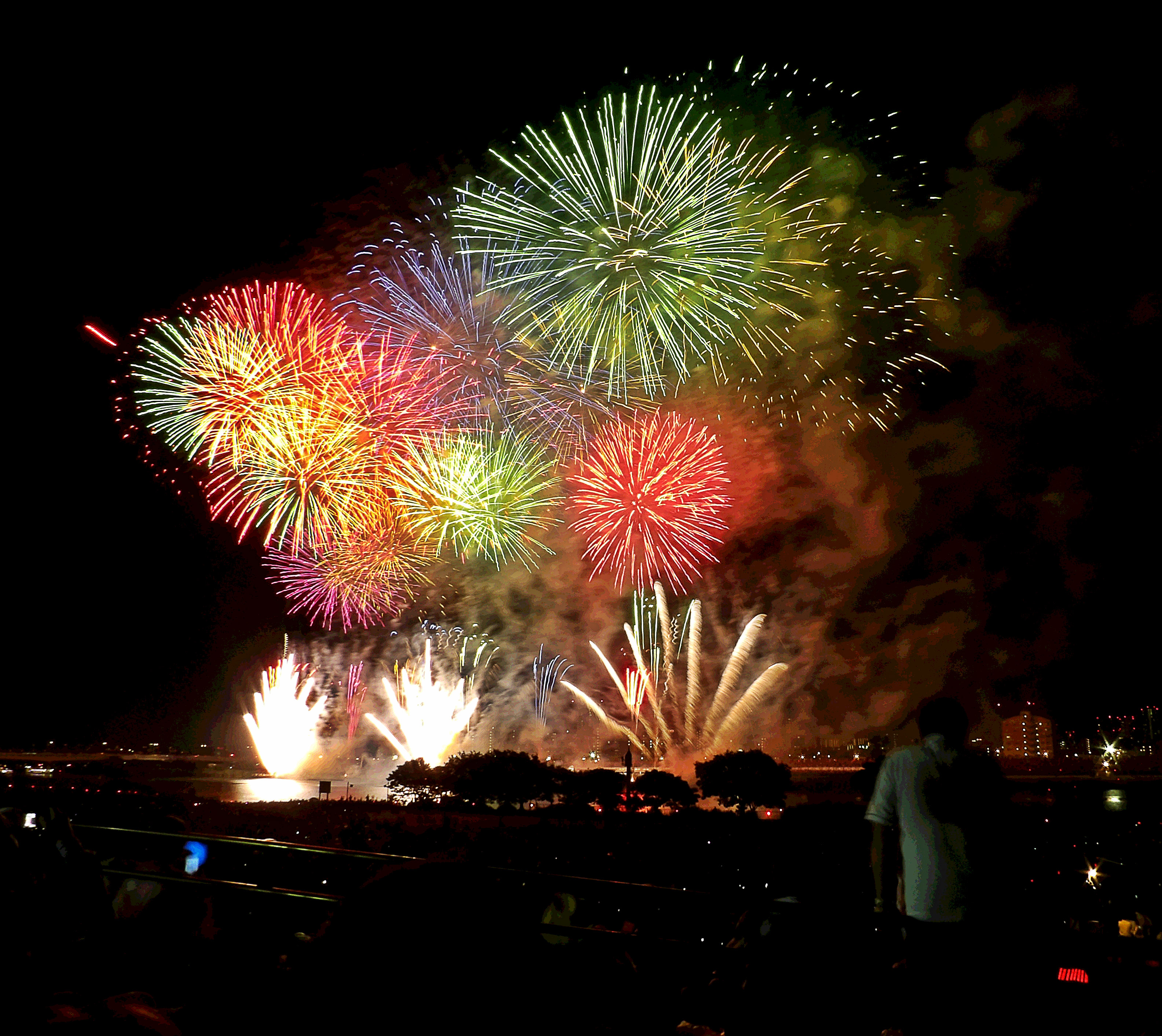 足立の花火2016年